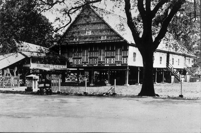 Foto. Het huis van de Radja van het vorstendom Boni op Celebes.